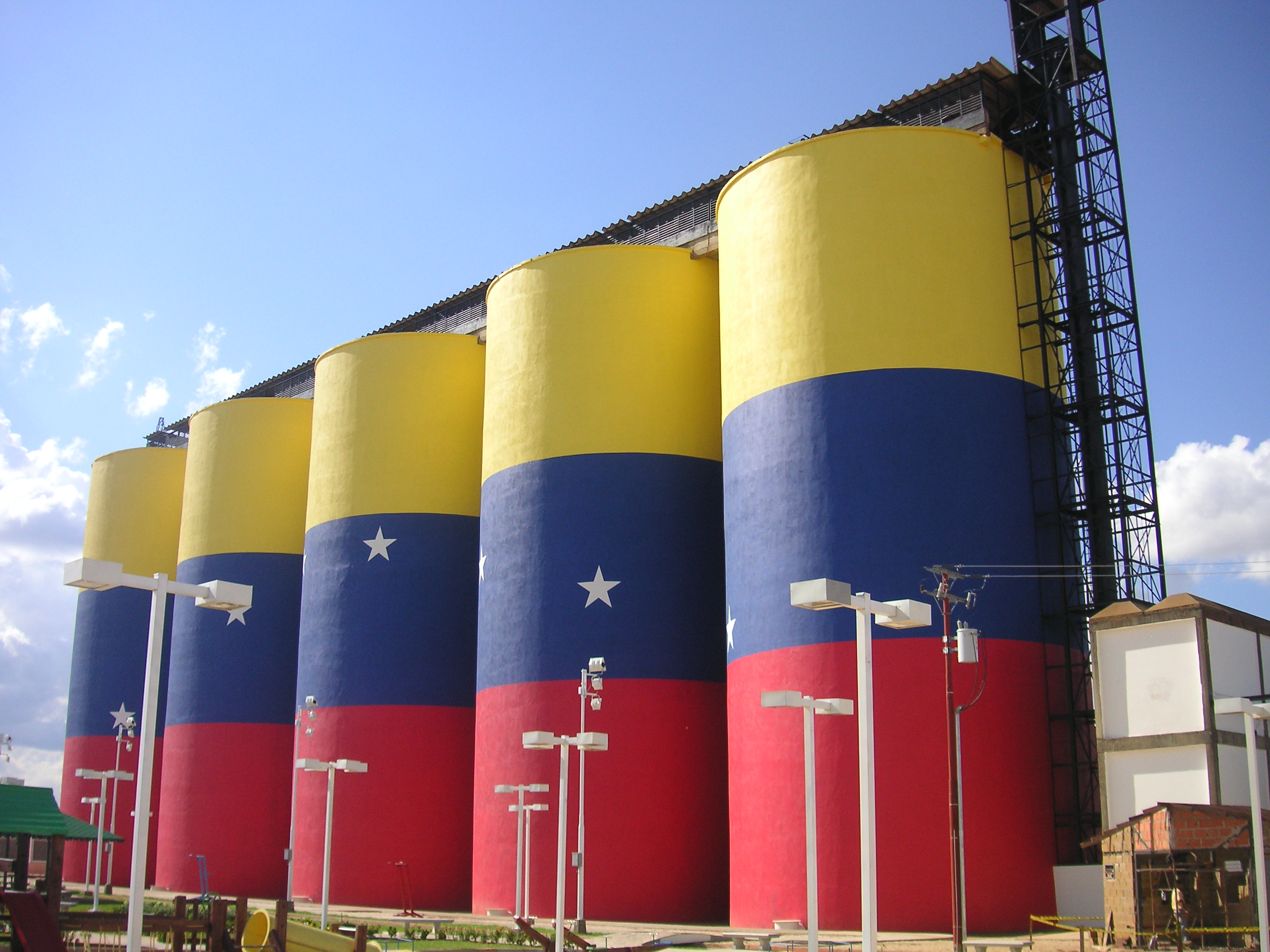 La bandera más grande del mundo, Estado Anzoátegui, Venezuela.